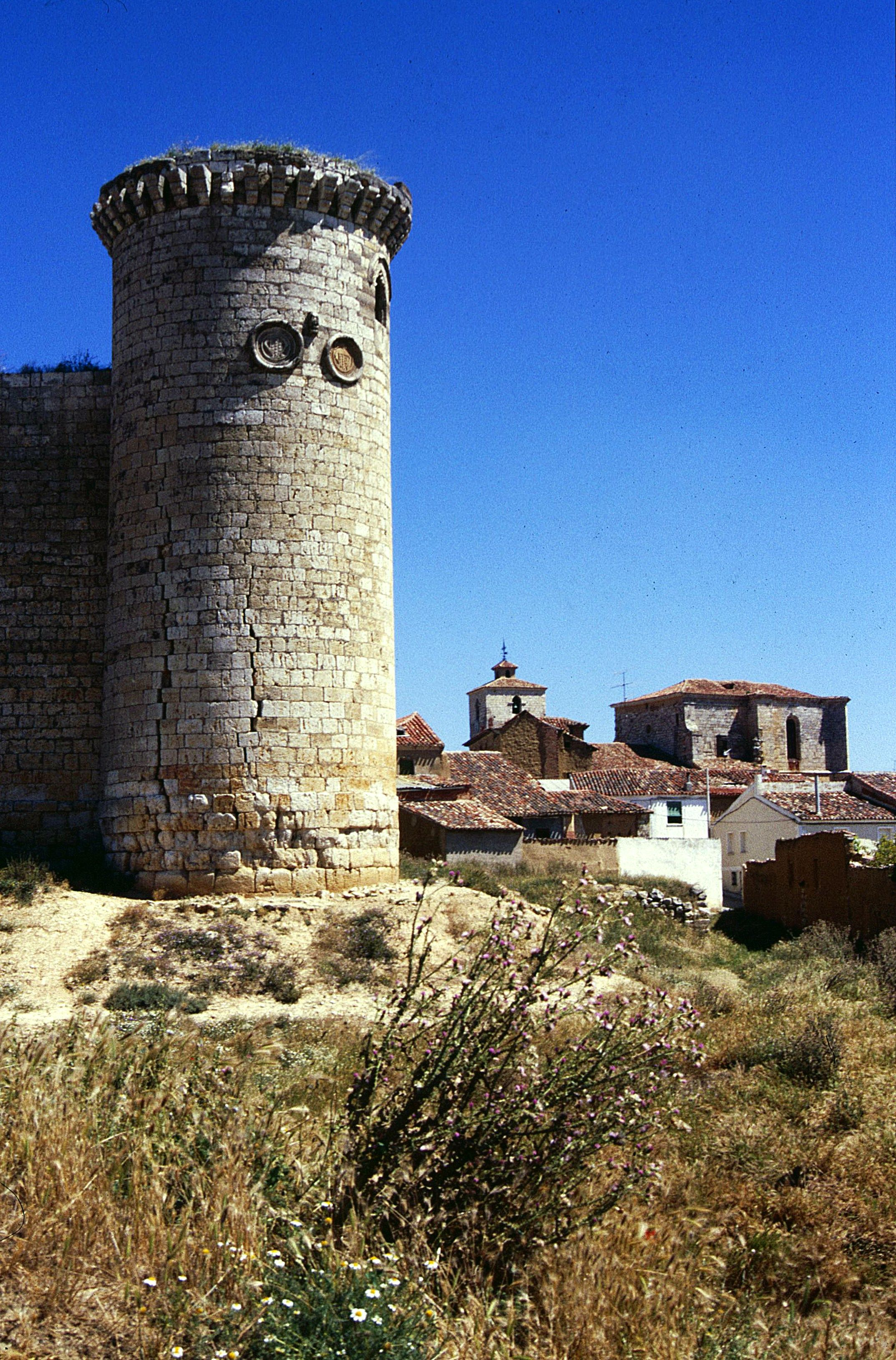 Fuentes de Valdepena